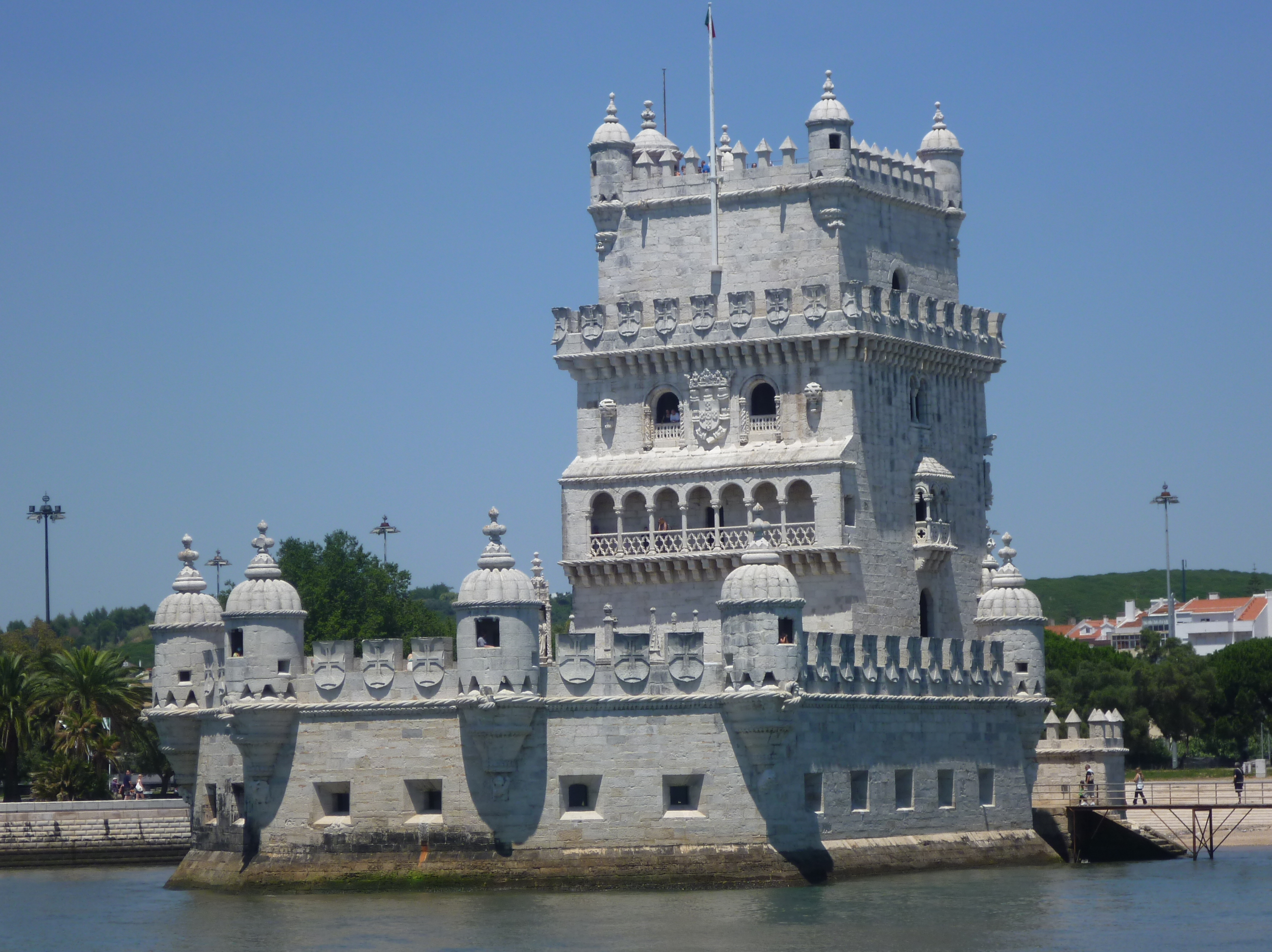 La torre di Belém vista dal fiume Tago